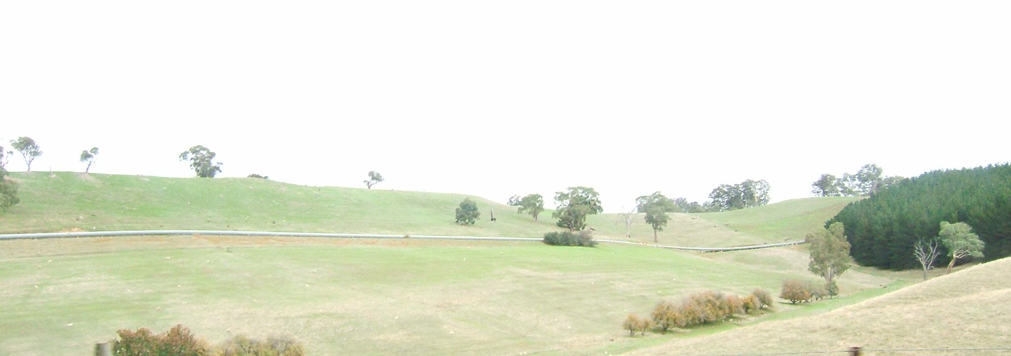 Mannum Adelaide Pipeline